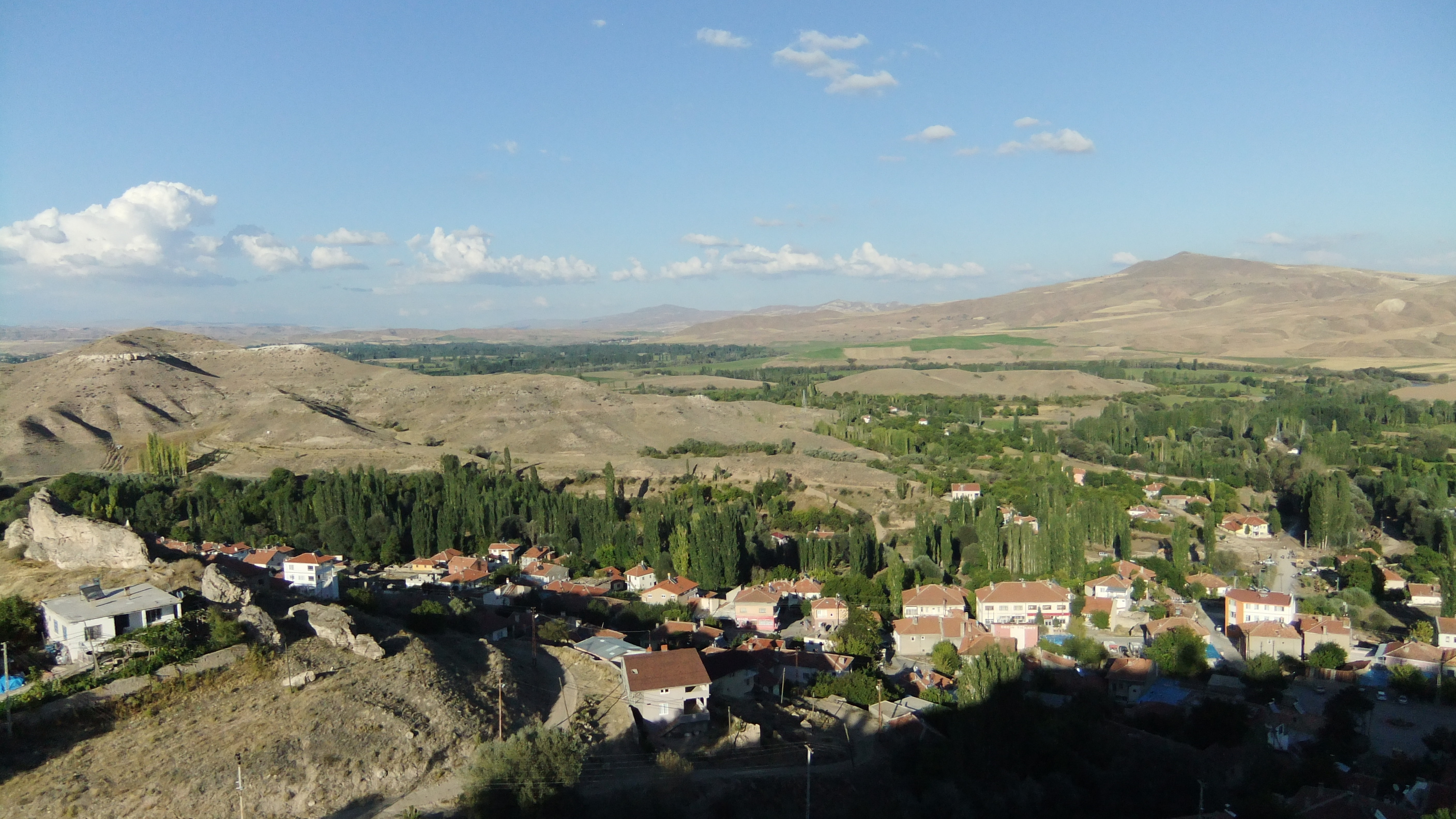 Kaleden Karaözü üst taraf